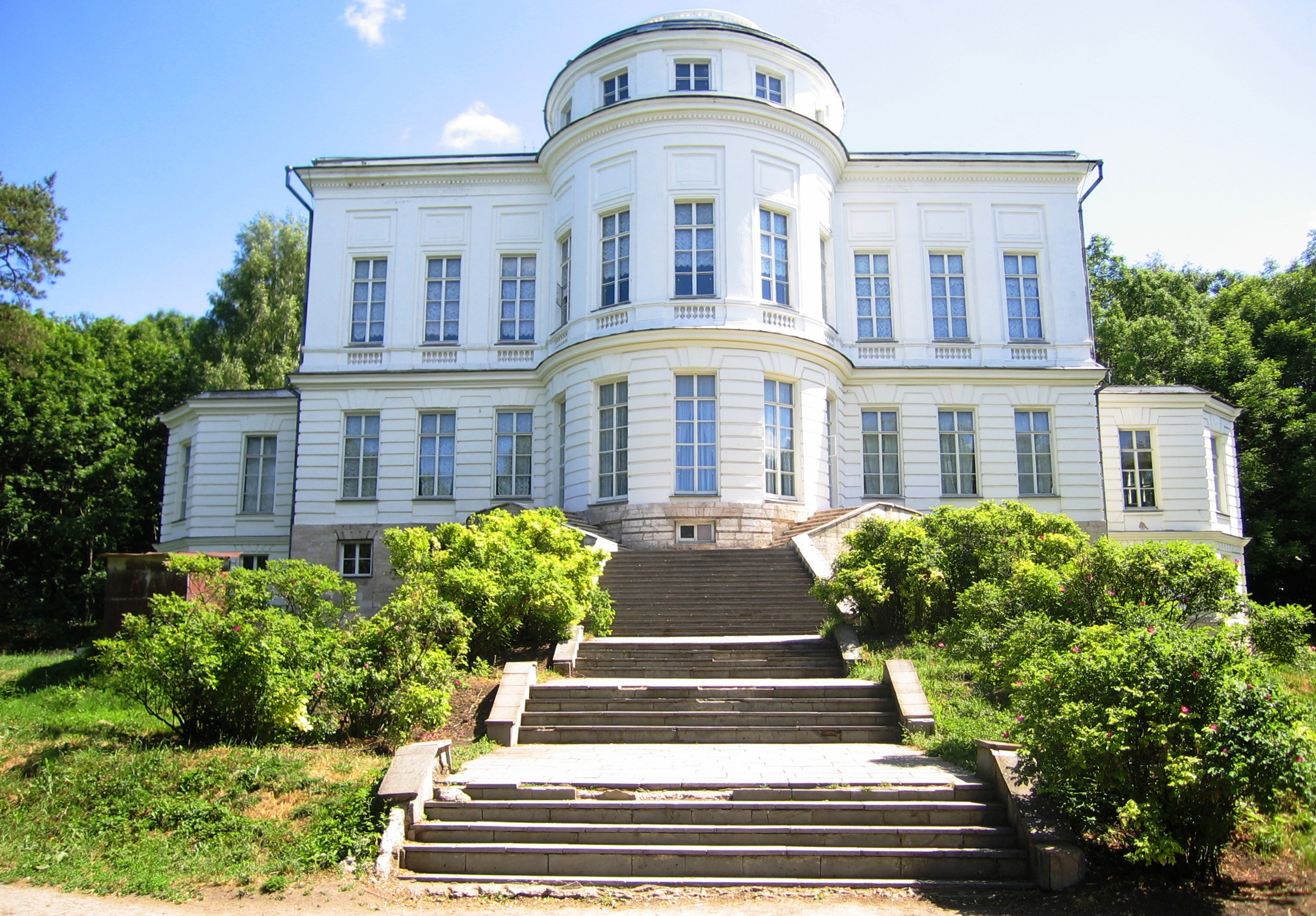 Дворец-музей графов Бобринских